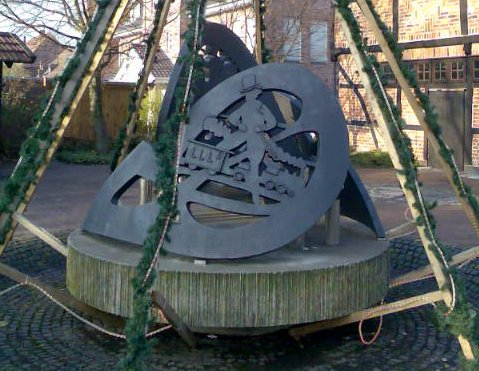 Darstellung des "Tollen Bombergs" auf dem Dorfplatz von Buldern, Deutschland